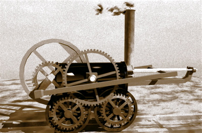 Modell der Dampflokomotive von Richard Trevithik, 1804; selbsterstelltes 3D-Modell